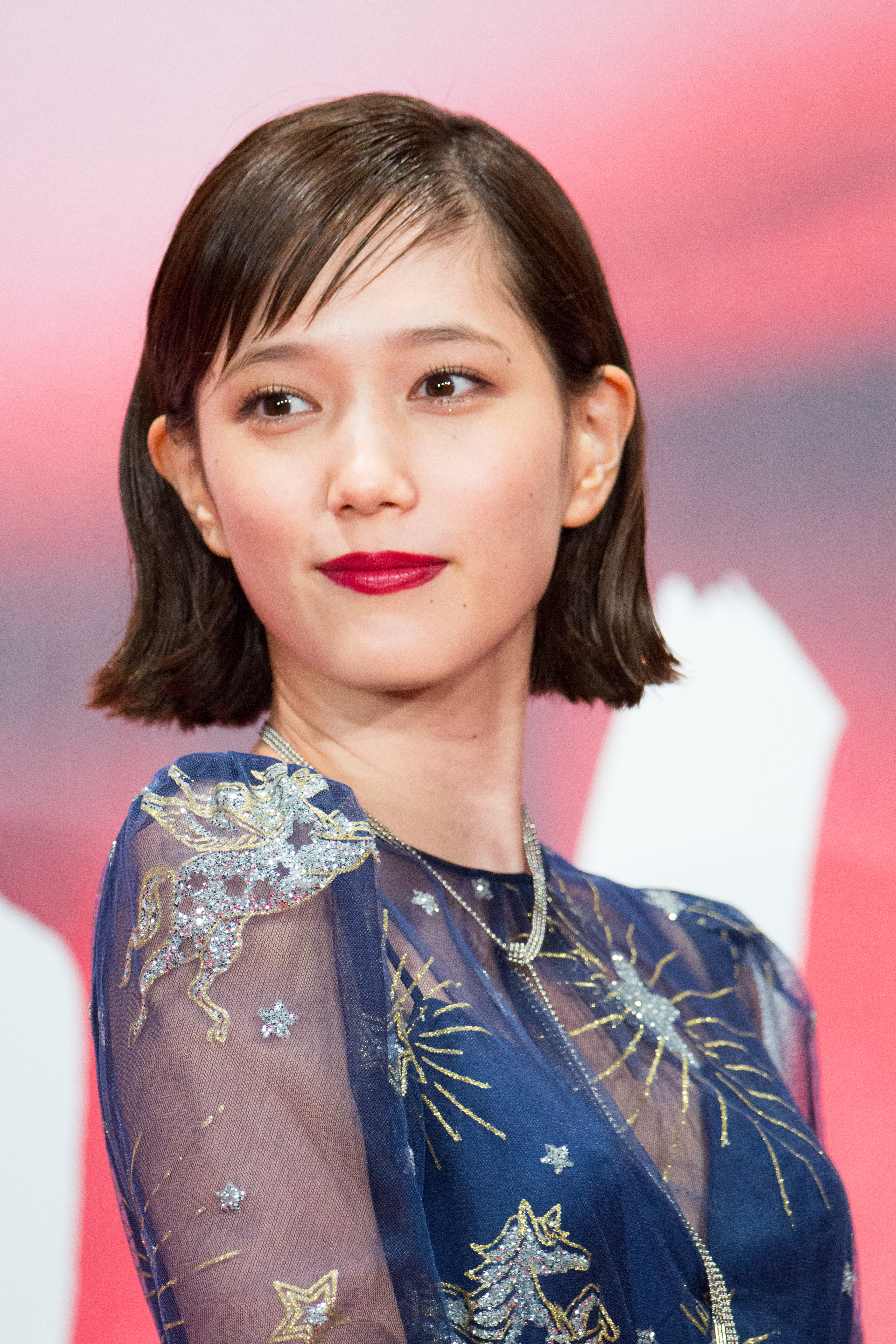 第30回 東京国際映画祭 オープニングセレモニー 本田翼 (鋼の錬金術師)